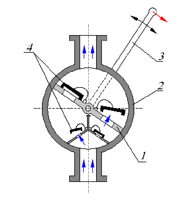 Конструктивная схема крыльчатого насоса